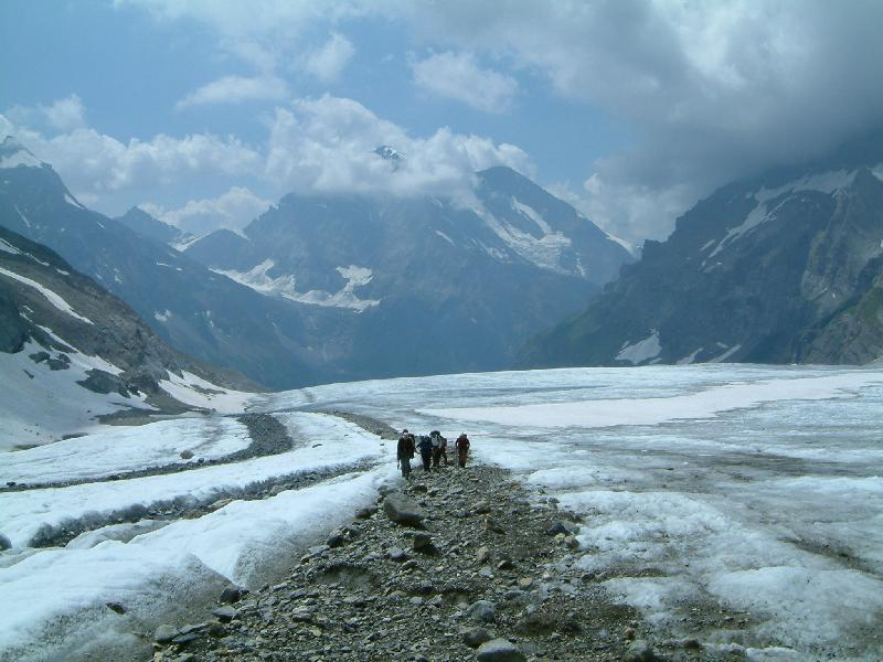 Auf dem Kandergletscher